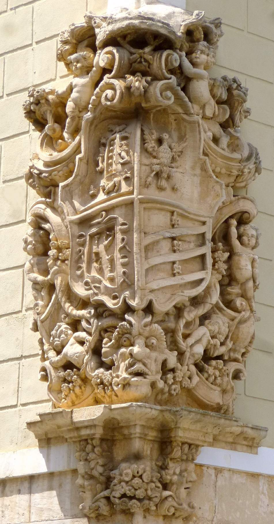 Palacio del Marqués de Arneva, actual Ayuntamiento de Orihuela (Alicante)